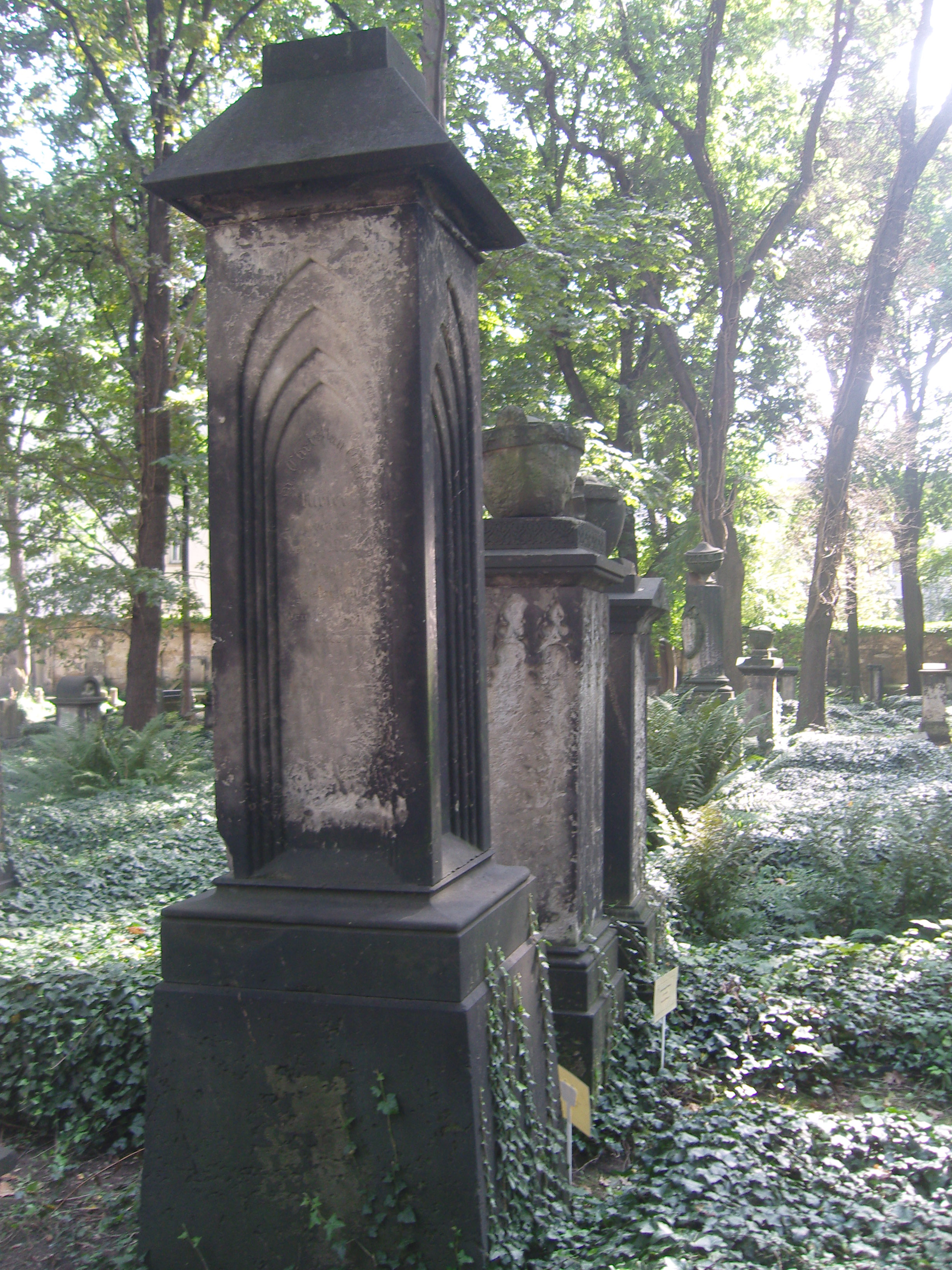 Grabmal nach einem Entwurf von Caspar David Friedrich auf dem Eliasfriedhof in Dresden